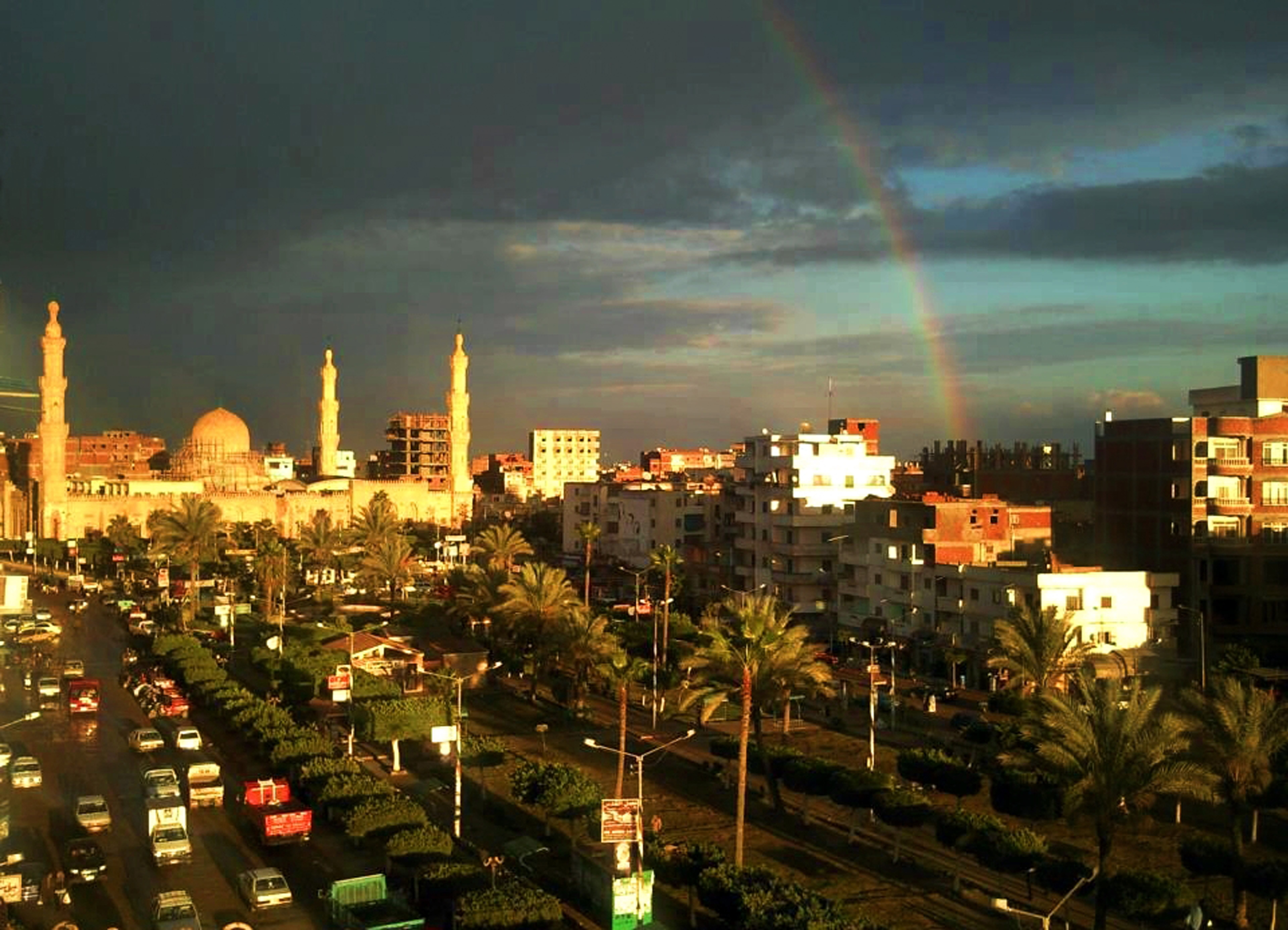 تصنيف:صور من دسوق